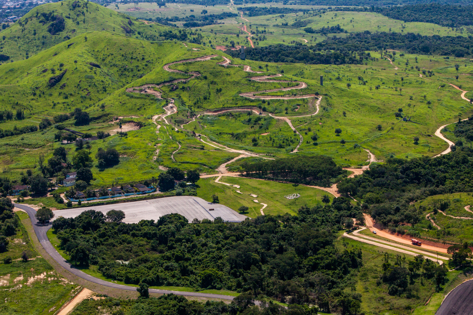 Circuito Olímpico de Mountain Bike